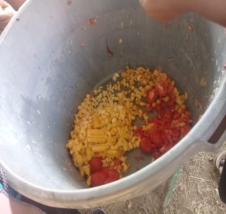 preparación estofado